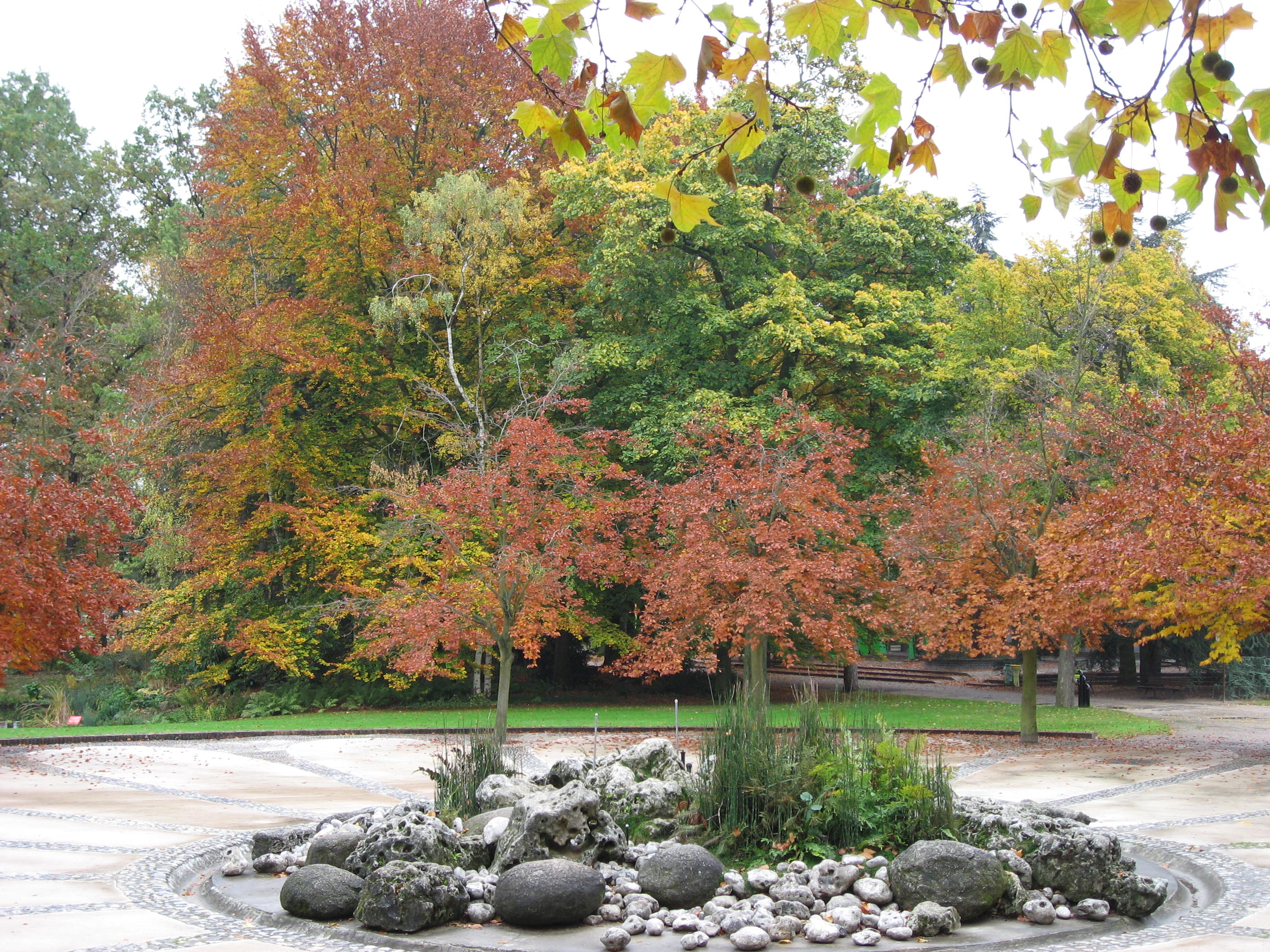 L'automne au Parc floral de Paris Map: 48° 50' 19" N 2° 26' 33" E